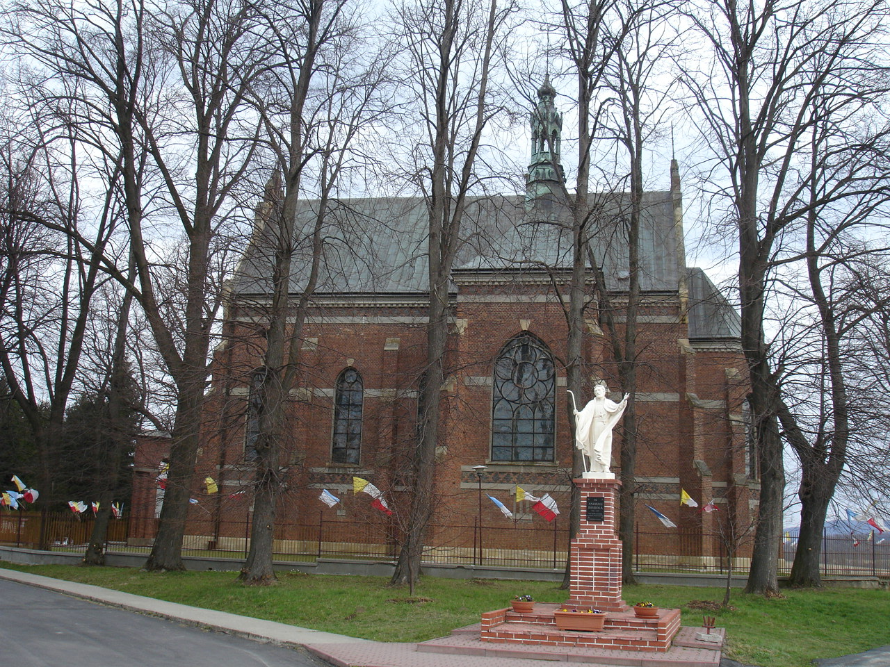 village Strachocina, Poland